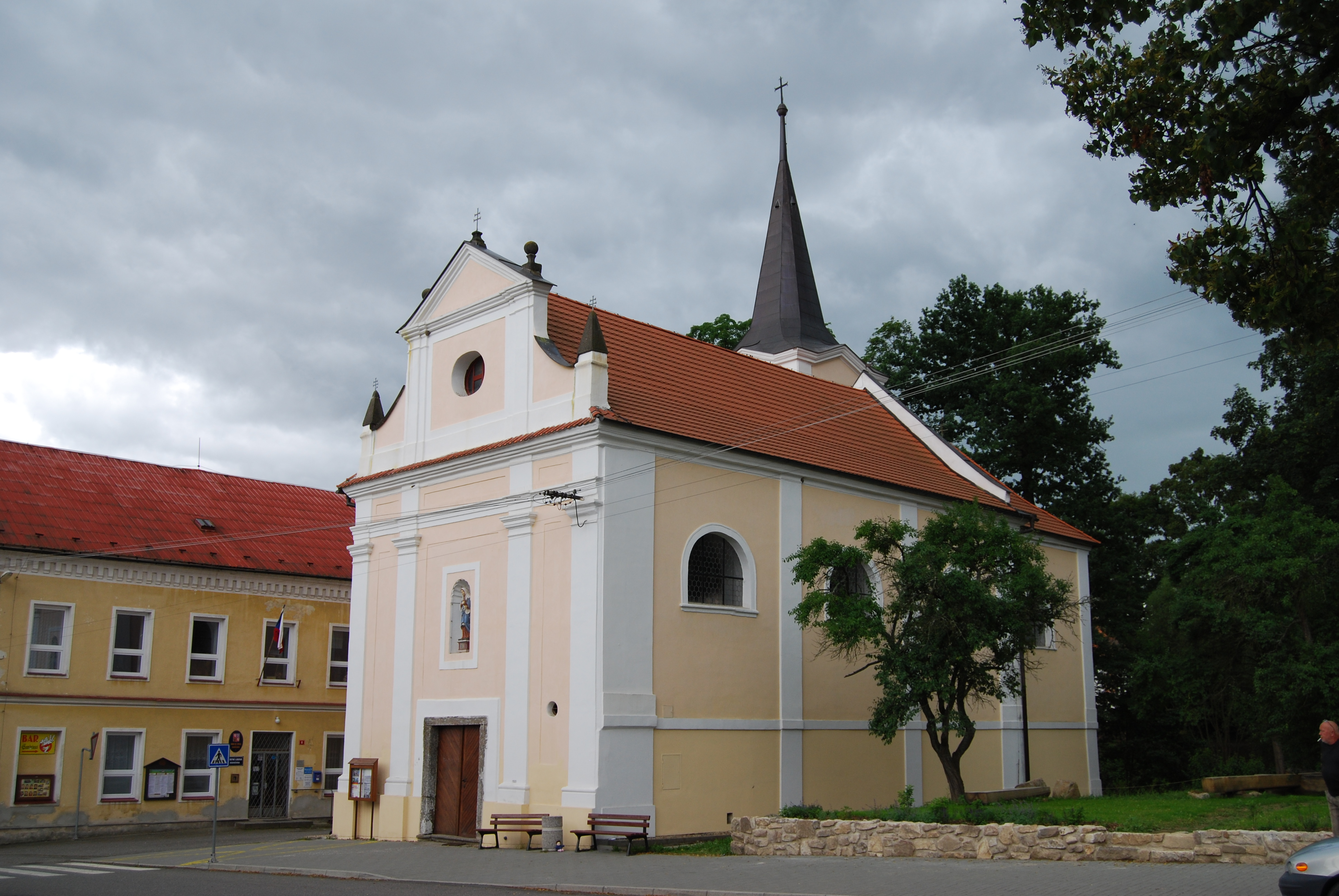 Kostel Nejsvětější Trojice se nachází na náměstí.Obec Nadějkov v okrese Tábor v Jihočeském kraji. Česká republika.